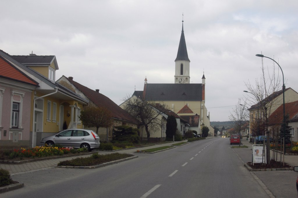 Dobermannsdorf, Lower Austria